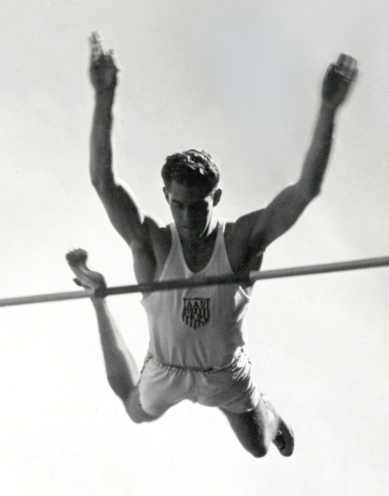 Atletiek.Tijdens een Internationaal Atletiek Concours in 1935 in het Olympisch Stadion in Amsterdam, springt de Amerikaan Sefton op het onderdeel polsstok hoogspringen een hoogte van 4.20 mtr.